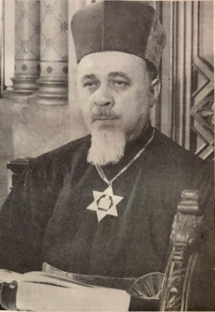 Portretul oficial al rabinului Moses Rosen (1912-1994)